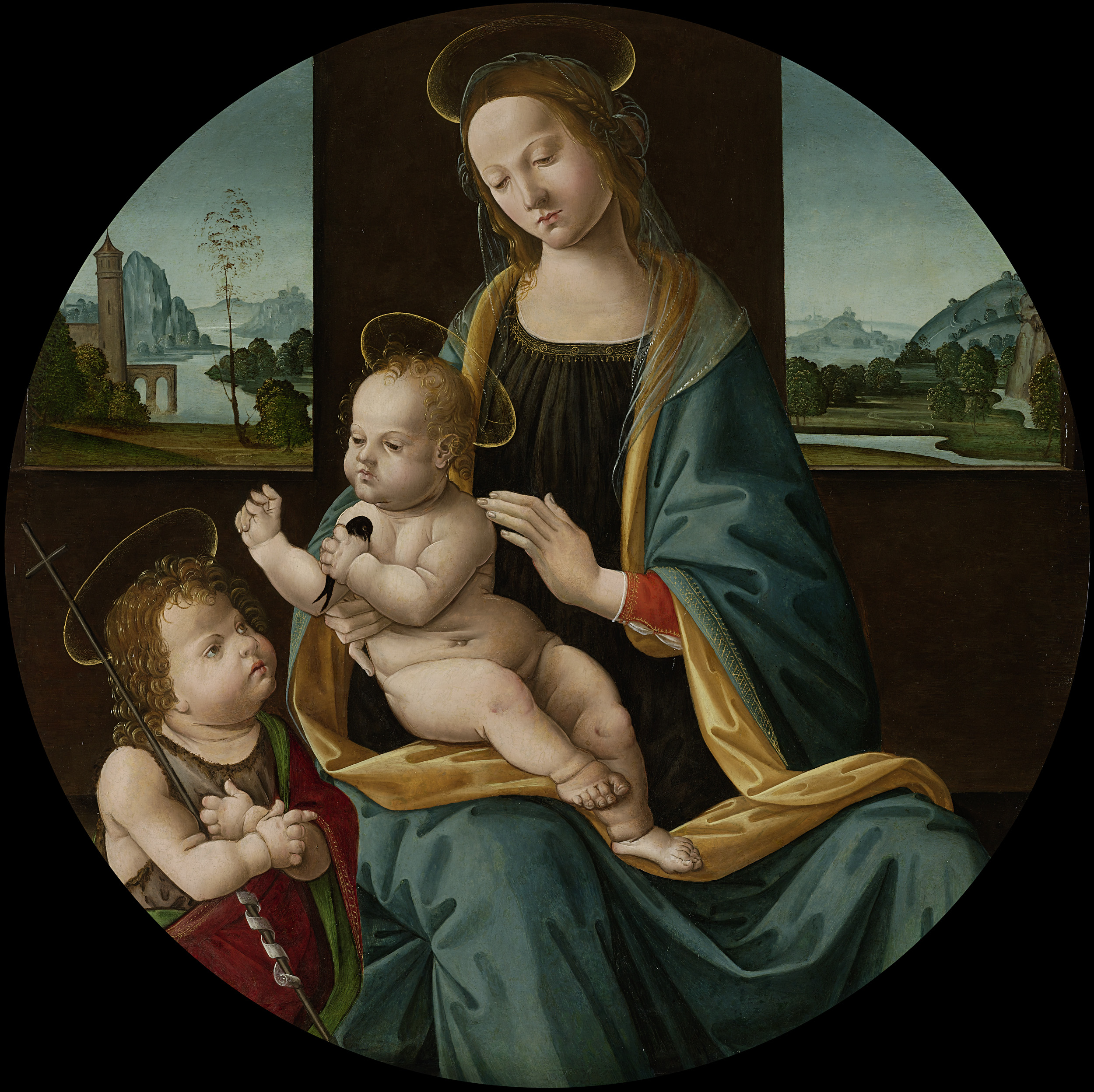 Maria met kind en Johannes de Doper. Maria zittend tussen twee vensters met het Christuskind op schoot, het kind houdt een zwaluw in de linkerhand. Links Johannes de Doper als kind. Door de vensters zicht op een landschap met bergen en rivieren.; Meester van de Conversazione di Santo Spirito (werkzaam ca. 1480-1520), Florence, ca. 1490–1515, olieverf op paneel